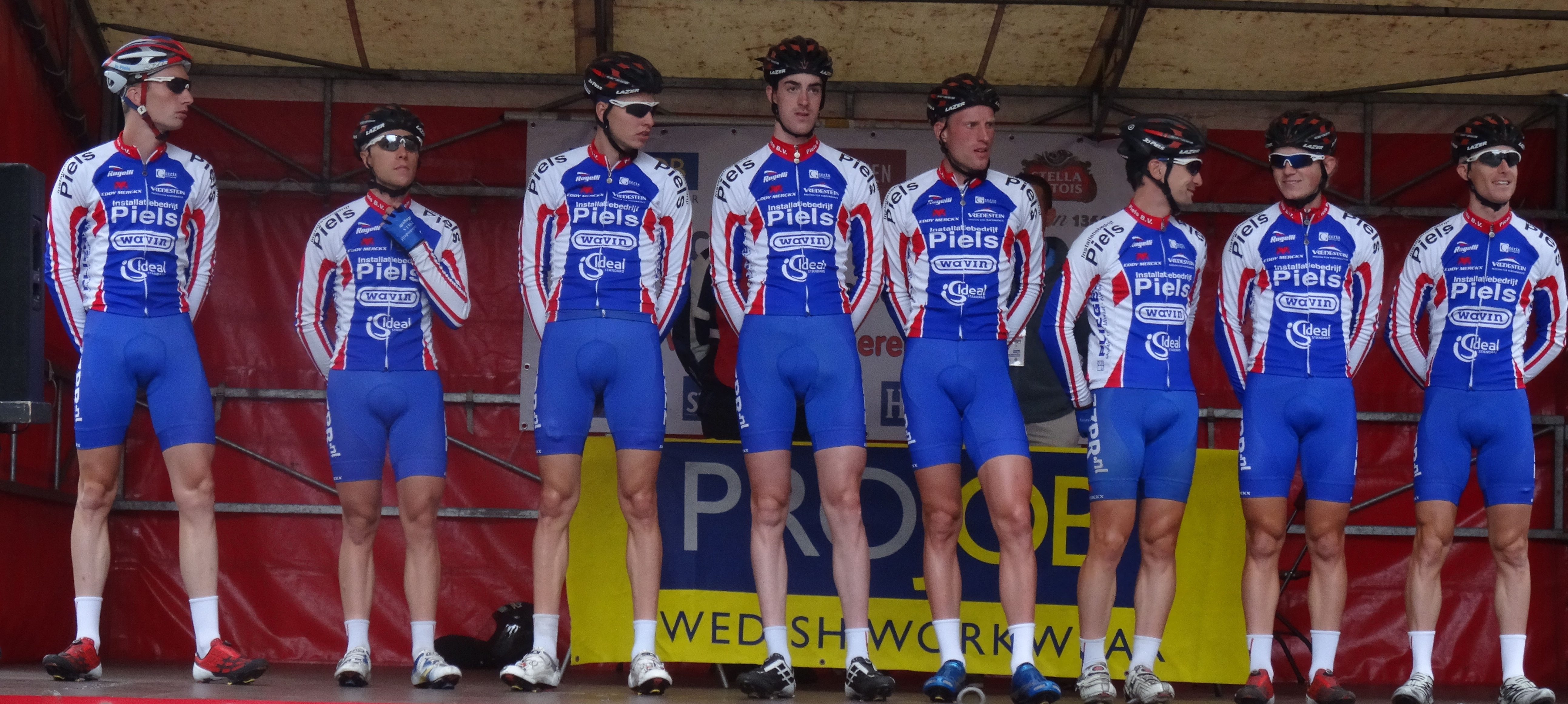 Reportage photographique réalisé le dimanche 14 septembre à l'occasion du départ et de l'arrivée du Grand Prix Jef Scherens 2014 à Louvain, Belgique.